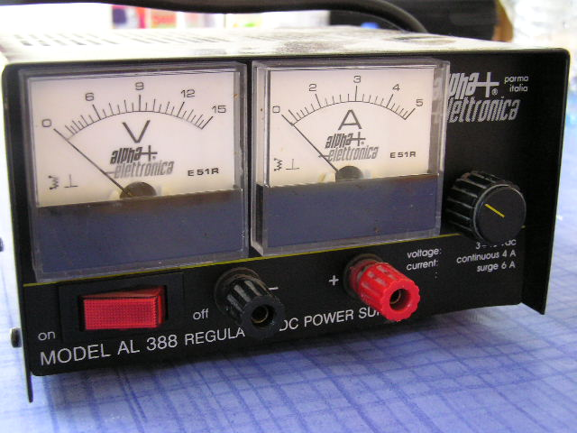 Aimentation stabilisée